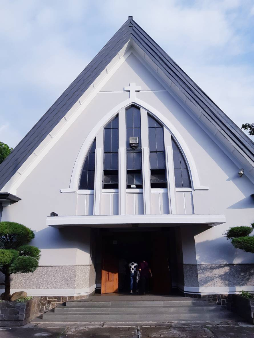 Tampak luar Gereja Pandu, Bandung